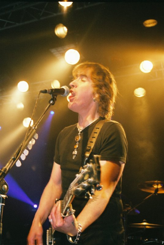 New Model Army en concert au Big Band Café, Caen/Hérouville Saint-Clair